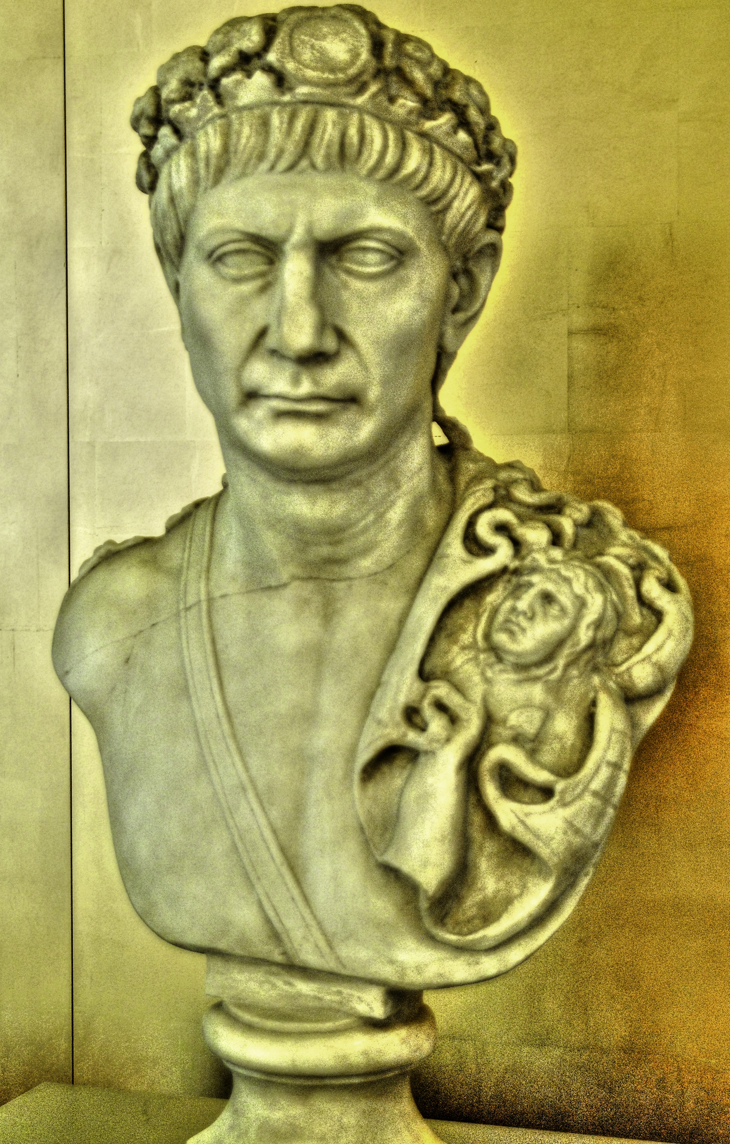 Die Colonia Ulpia Traiana liegt unweit von Xanten direkt am Rhein. Sie wurde um 100 nach Chr. von Marcus Ulpius Traianus zur Colonia erhoben.